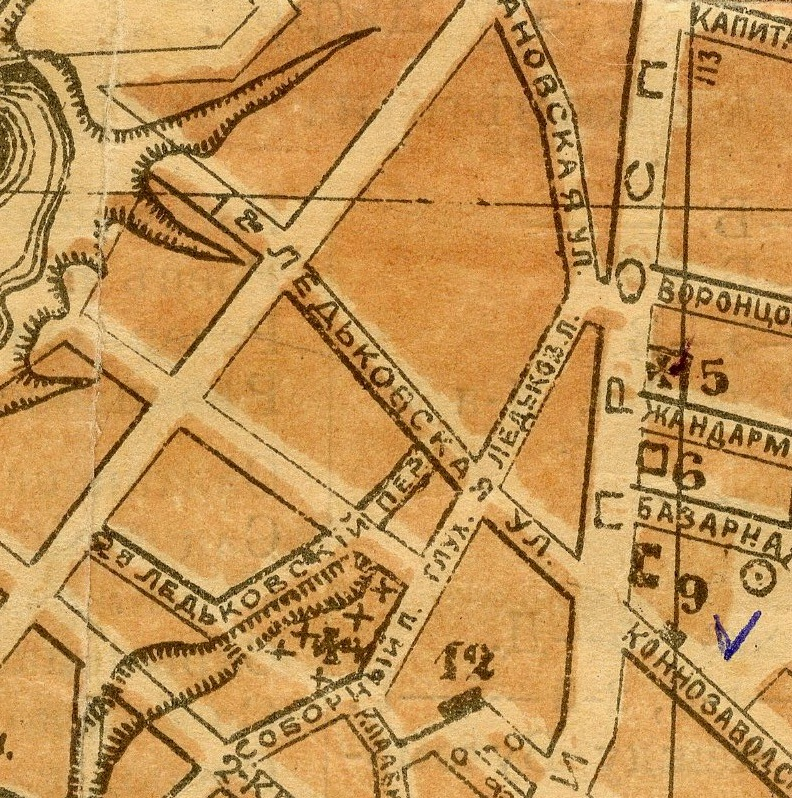 Беларуская (тарашкевіца): Магілёў (Магілёў). Плян места